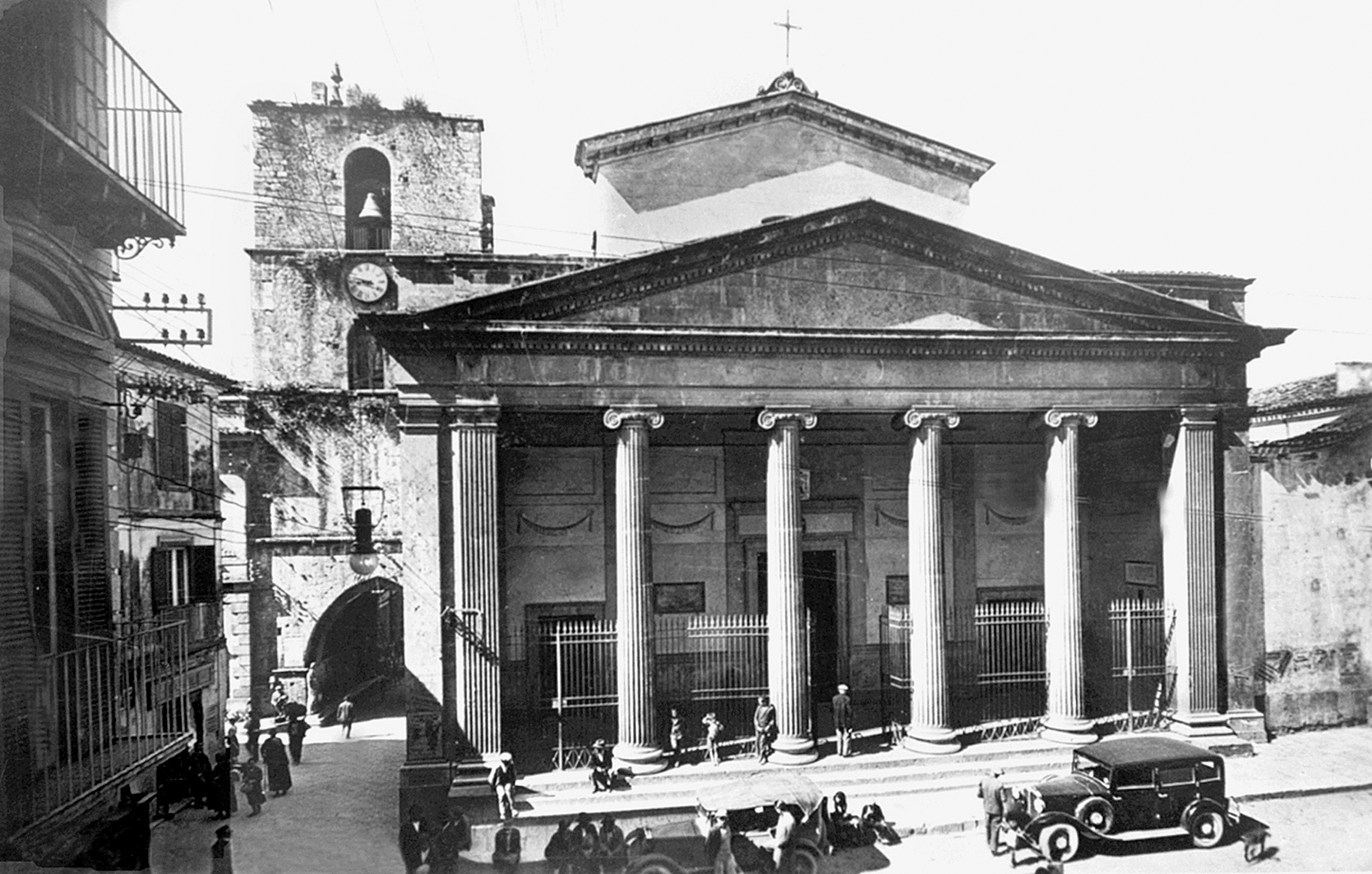 Cattedrale e Torre Civica (1925) (Isernia)